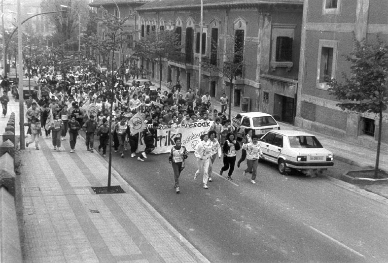 Korrika 6, 1989, Aiaraldean